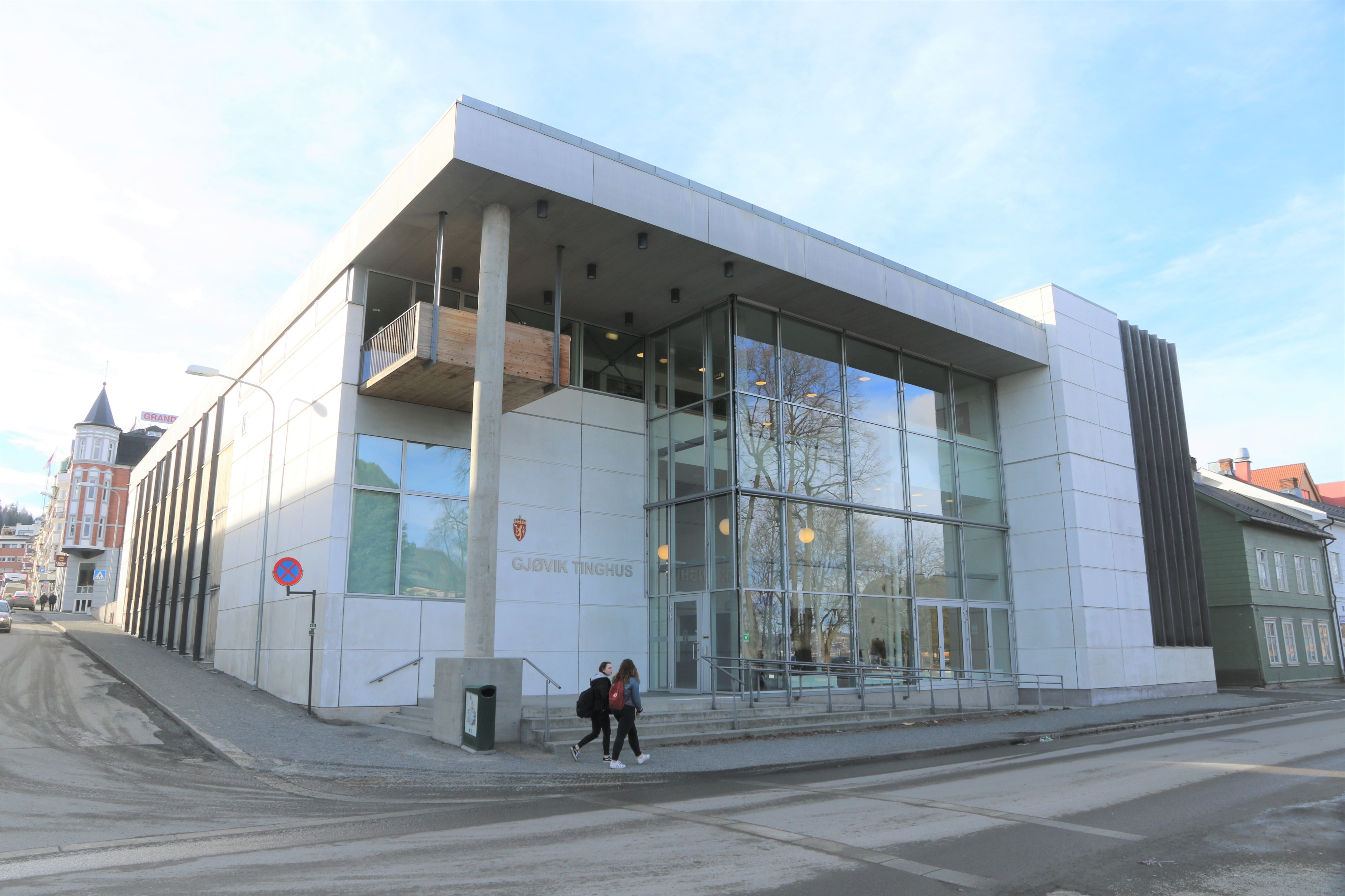 Gjøvik tinghus ved Strandgata.